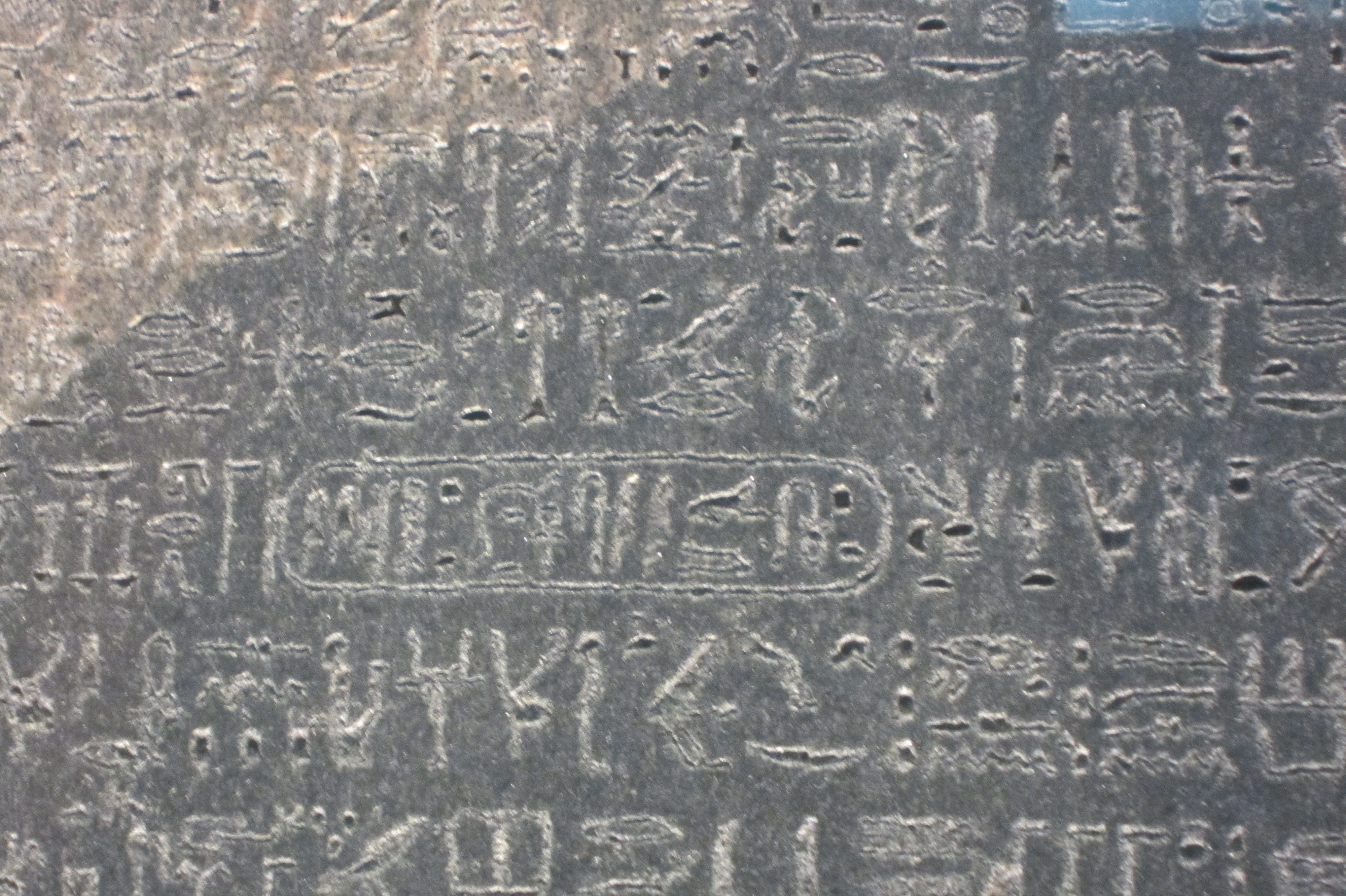 Carthouche van Ptolemaios op de Steen van Rosetta, British Museum, London.